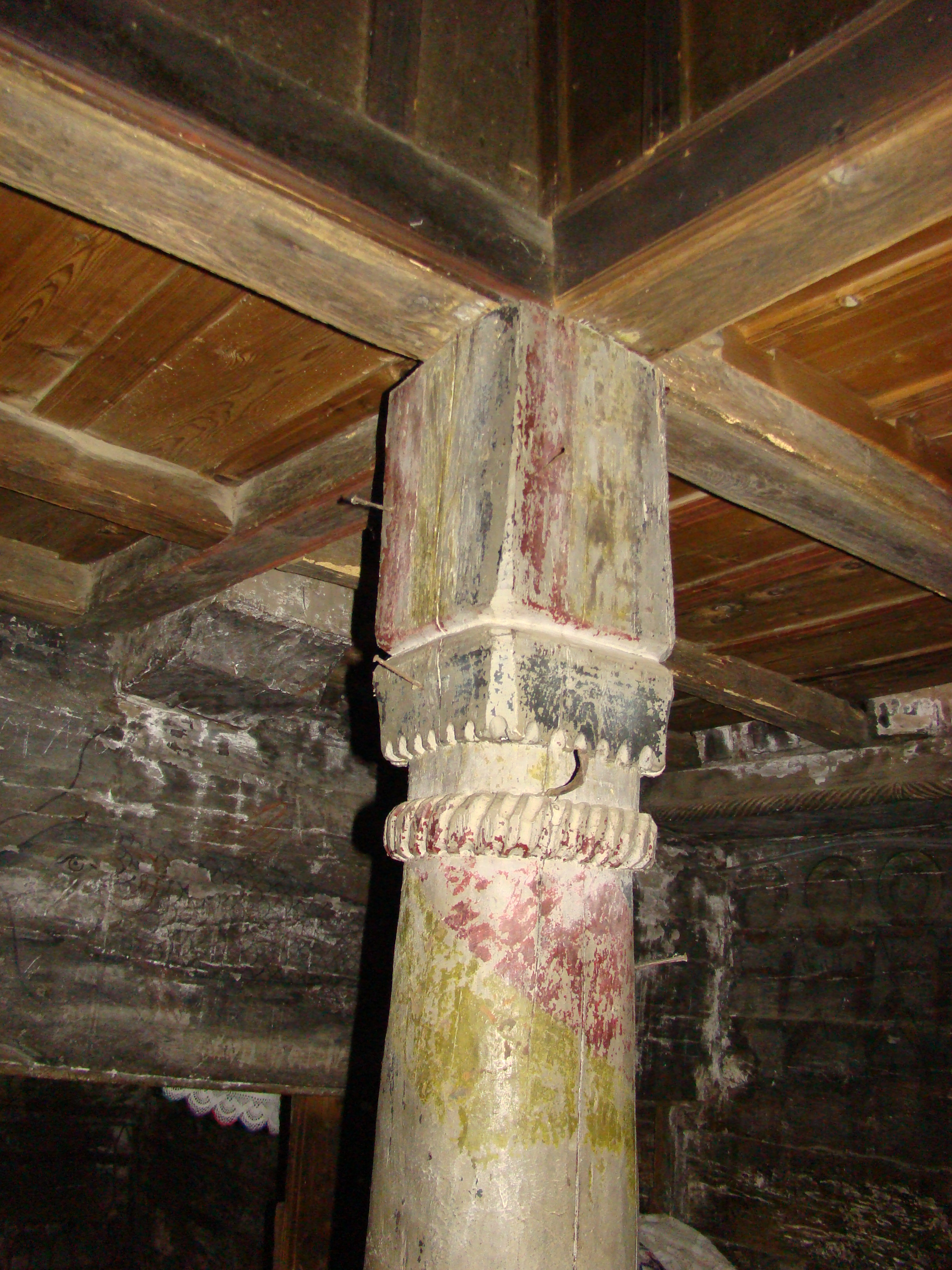 Biserica de lemn "Sfinții Arhangheli Mihail şi Gavriil" din Chieșd, județul Sălaj